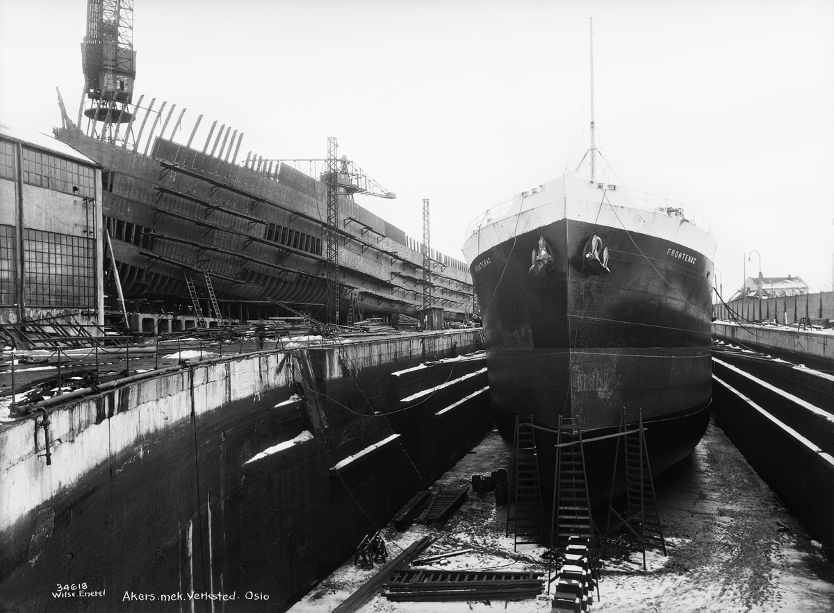 Akers mekaniske verksted, tørrdokk, skip Frontenac